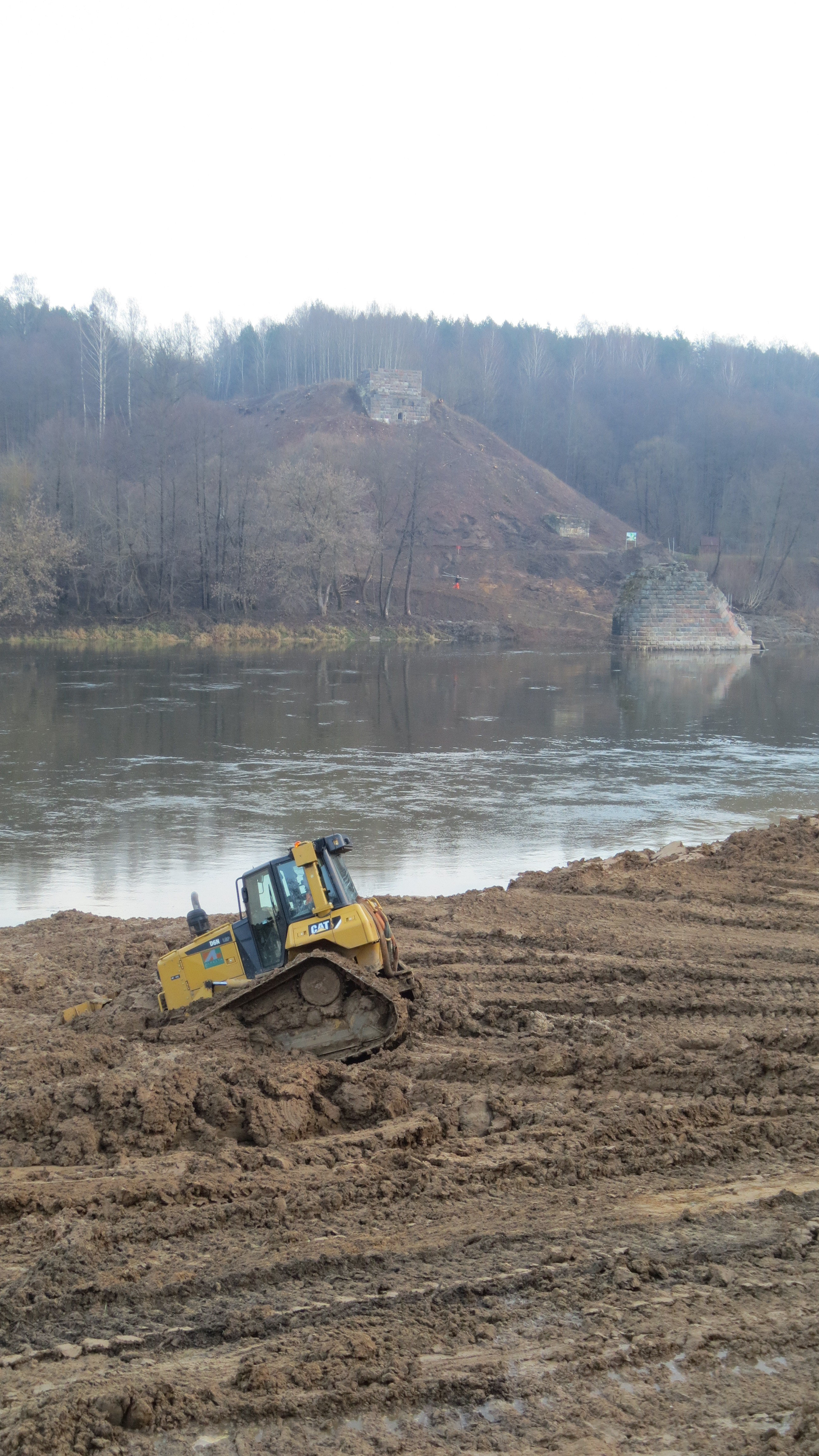 Statybvietės įrengimo darbai